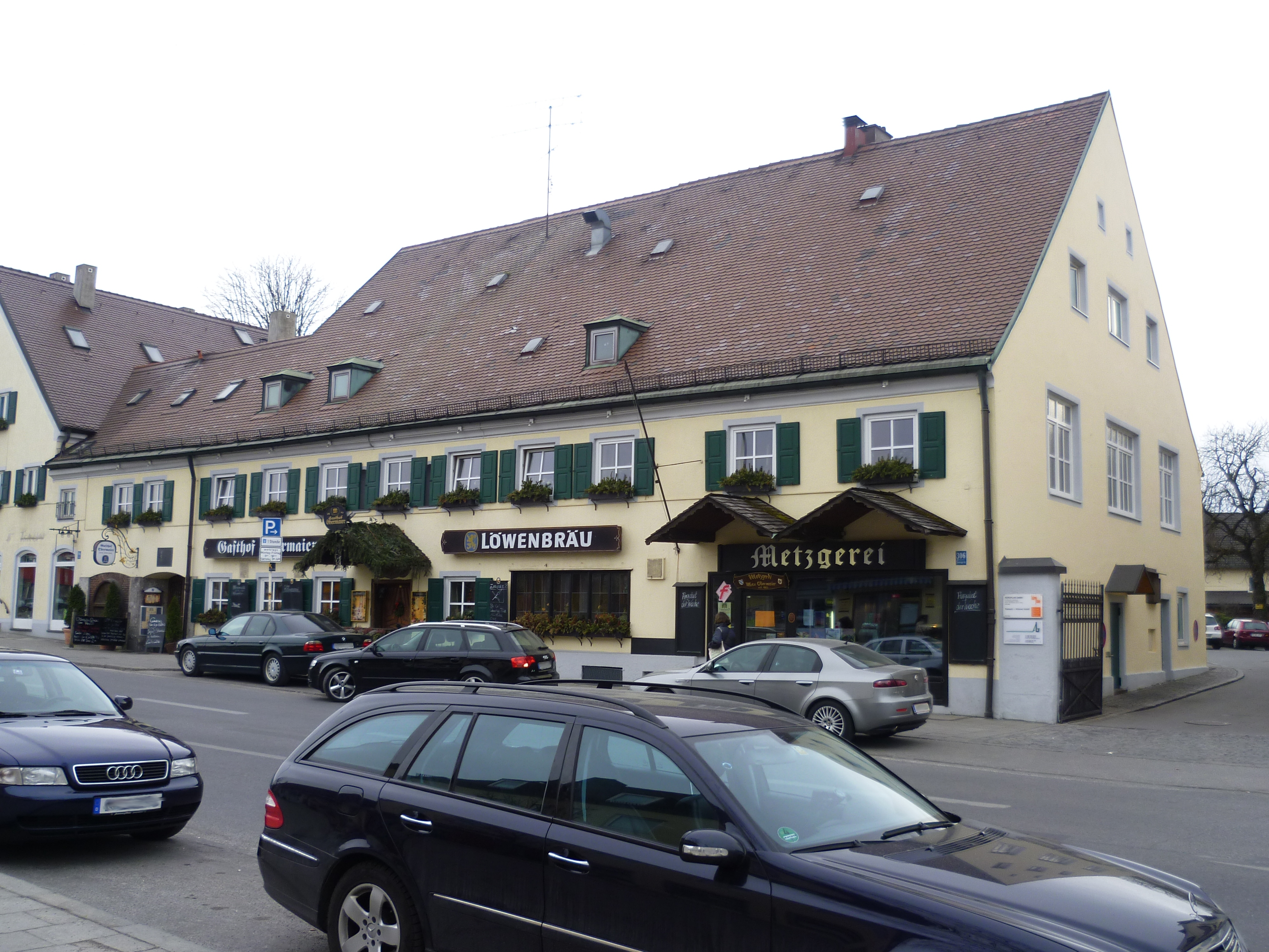 Gasthof Obermaier, Truderinger Straße 306, München-Trudering